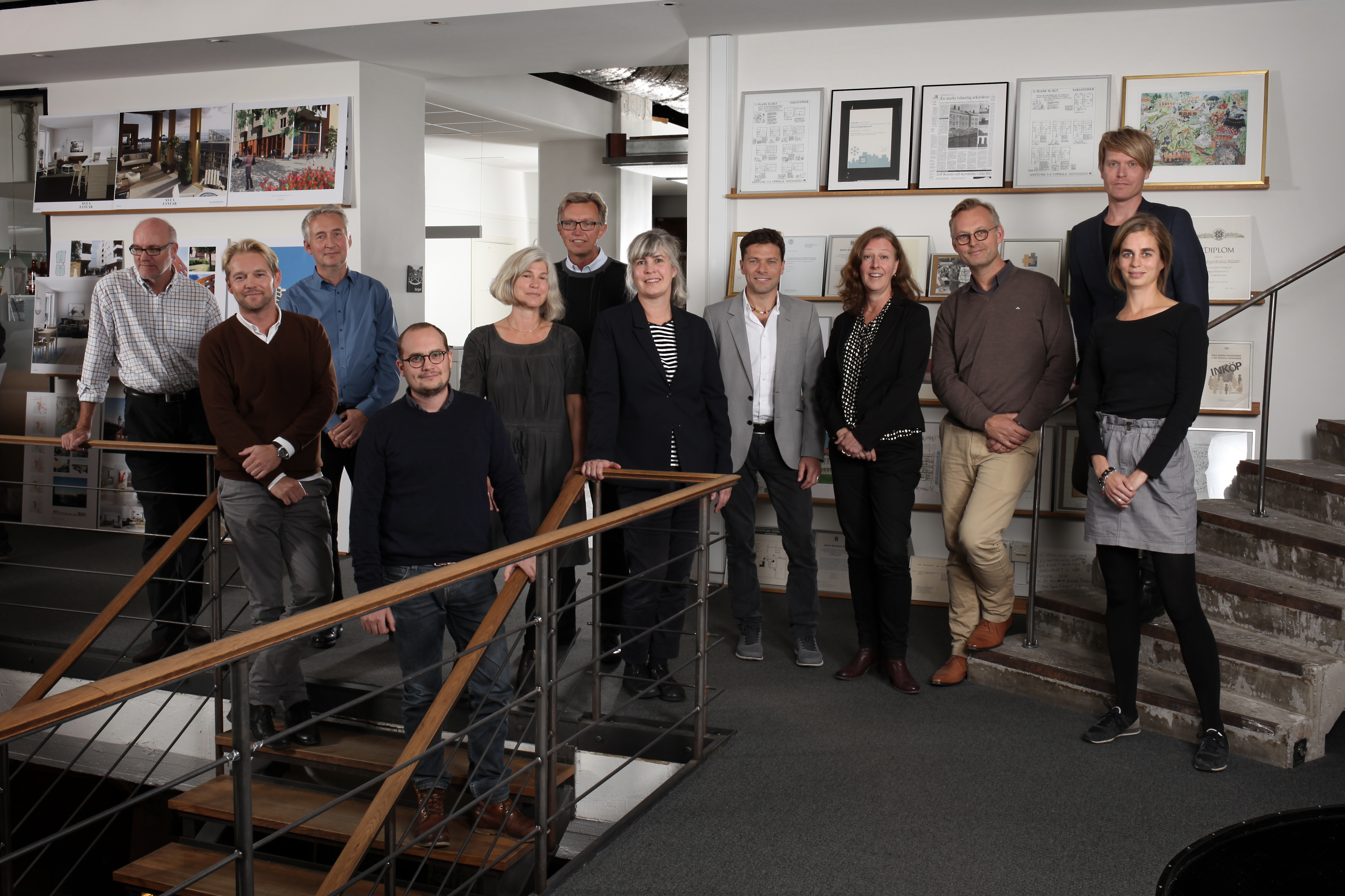 Brunnberg&Forshed, Ledningsgrupp 2014. Sören Eriksson, Johan Brogren, Hans Bergström, Pär-Olof Olofsson, Ingrid Moberg, Bengt Hellström, Ludmilla Larsson, Alessandro Lucca, Birgitta Gelhaar, Staffan Corp, Rikard Hedin, Johanna Gill.